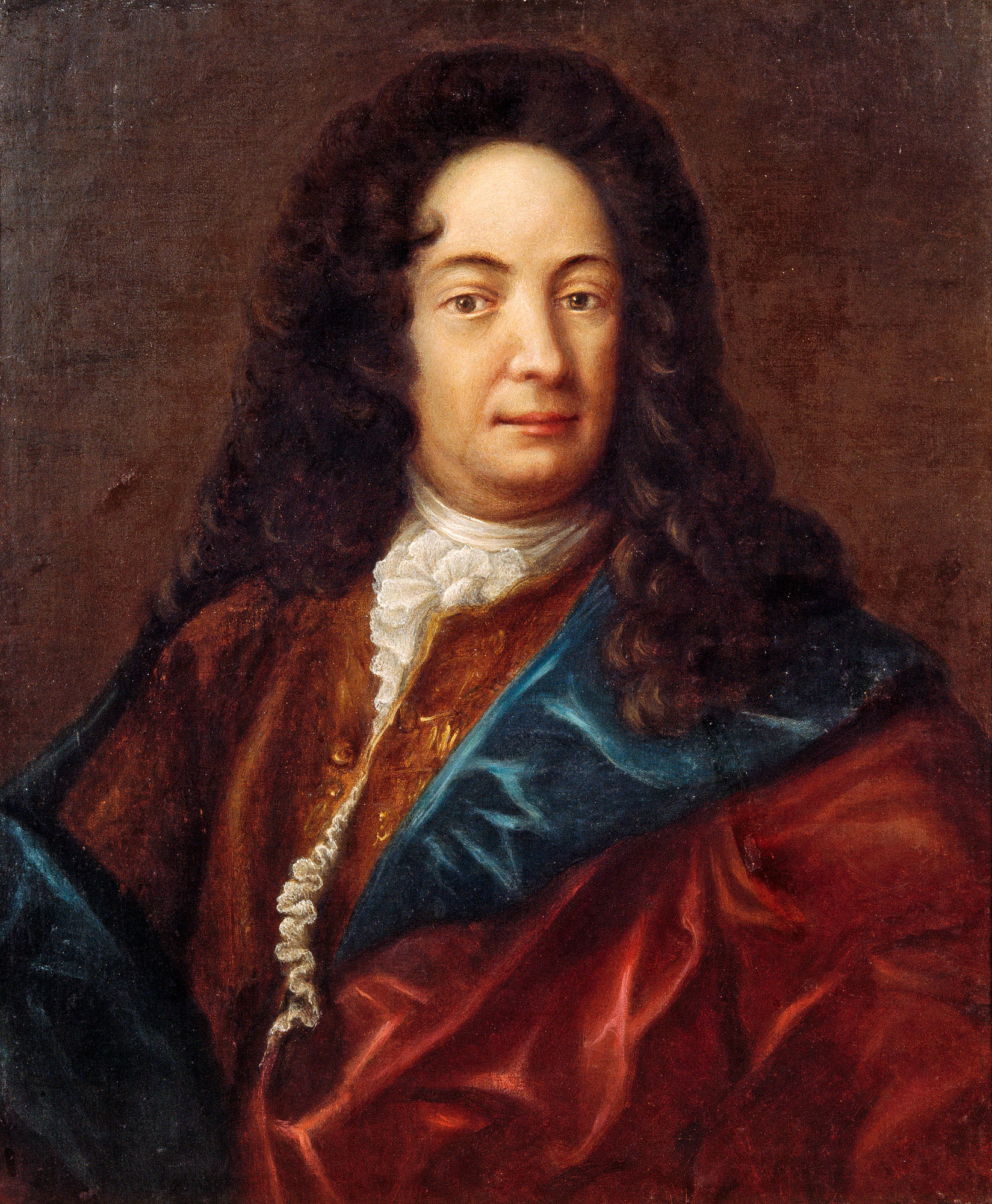 Ämbetsmannen och historiografen Olof Hermelin av Ludwig Weyandt.